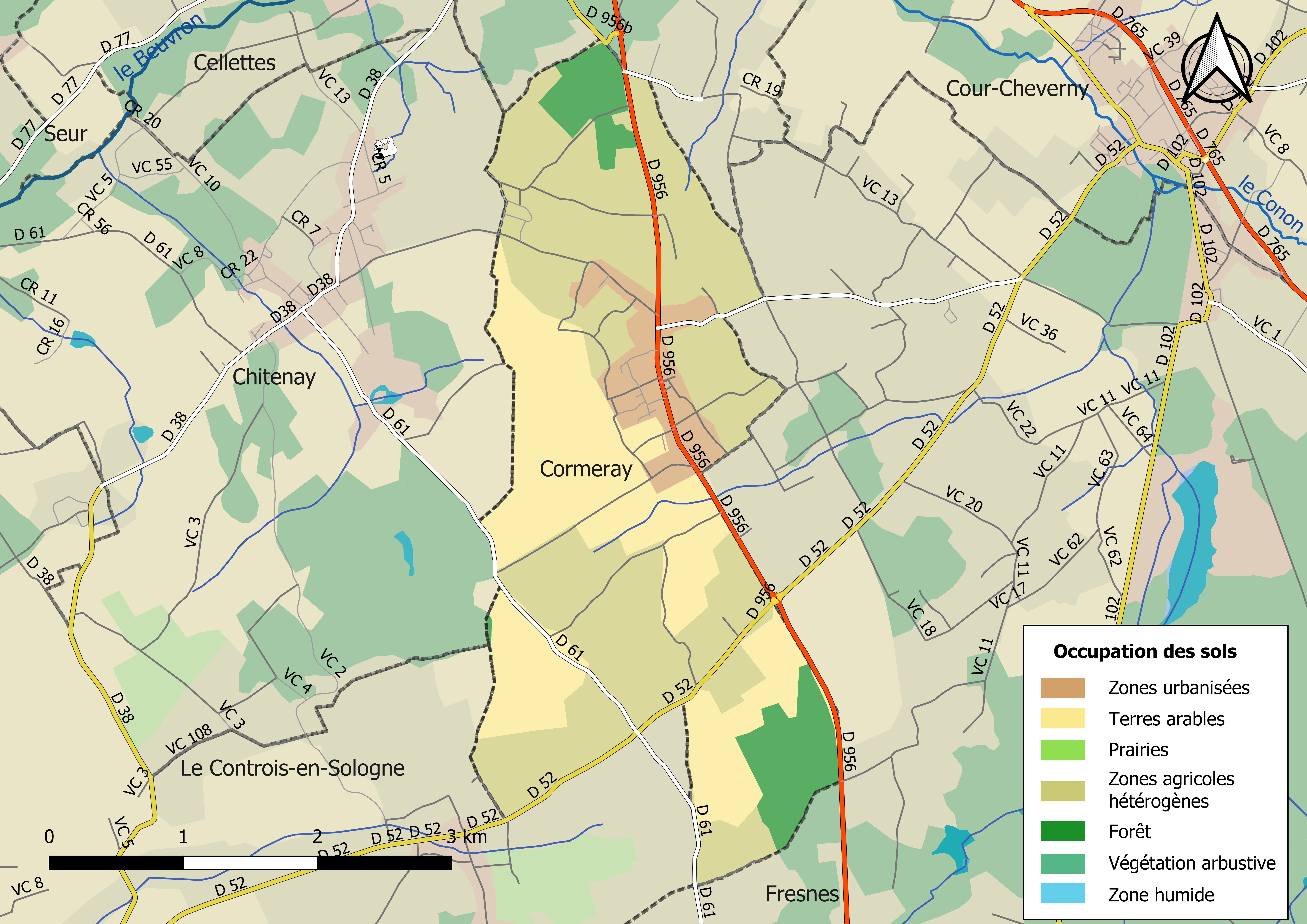 Carte des infrastructures et de l’occupation des sols en 2018 de la commune de Cormeray (France).